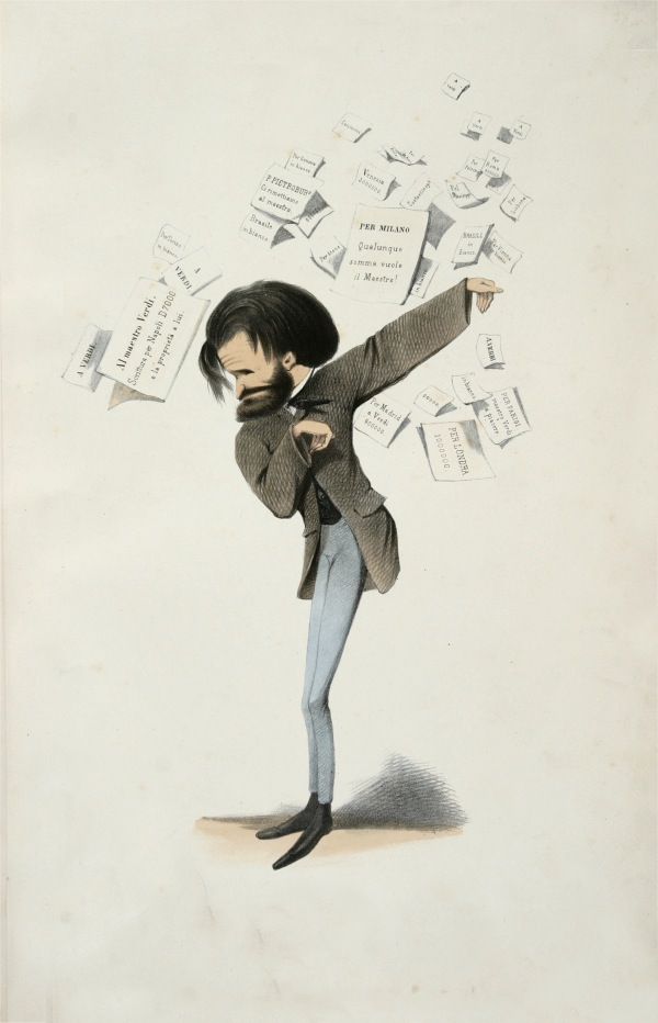 Caricature of Giuseppe Verdi.